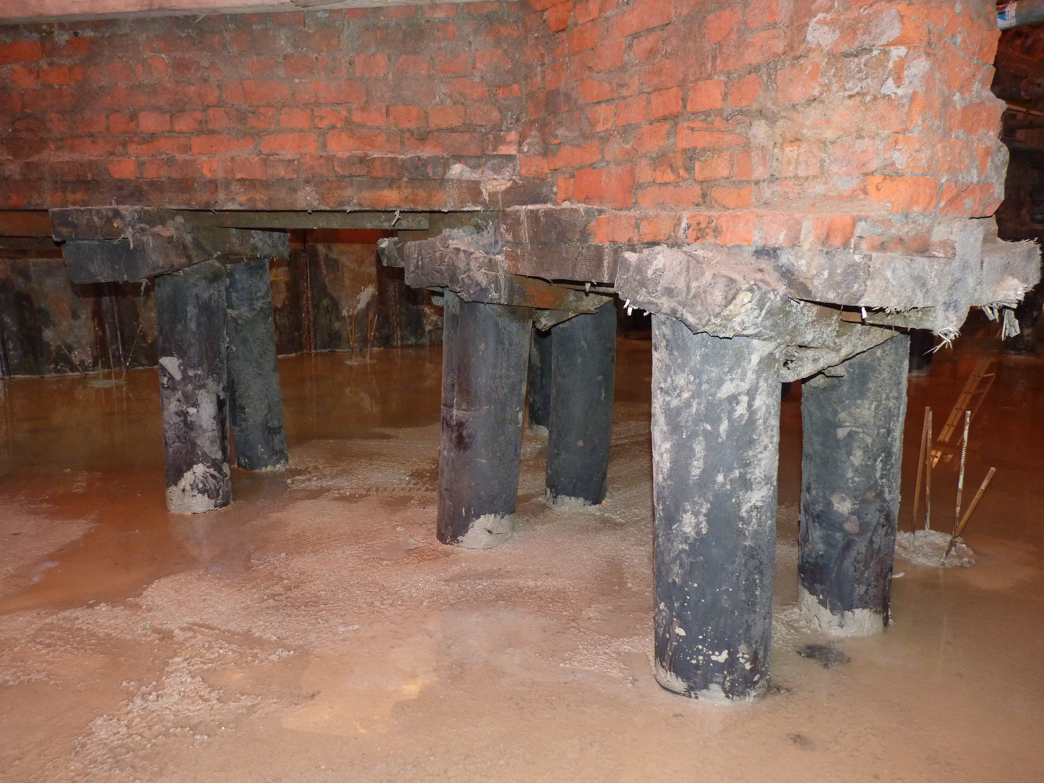 Houten paalfundering zoals aangetroffen bij funderingsinspectie / funderingsonderzoek